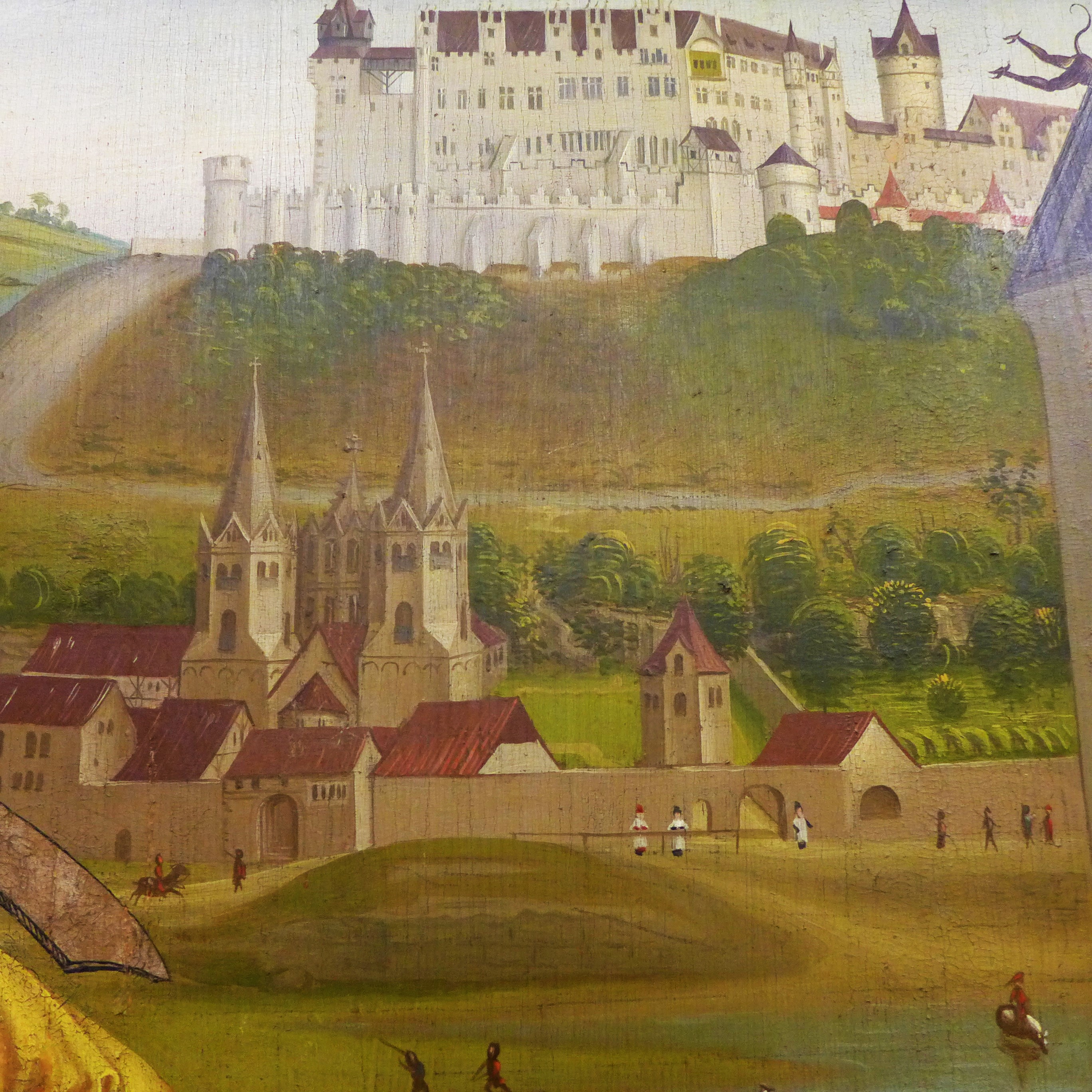 St. Burkard (Würzburg) am Mainufer unterhalb der Festung Marienberg, Meister des Kilianmartyriums, um 1490 (Martin von Wagner-Museum)